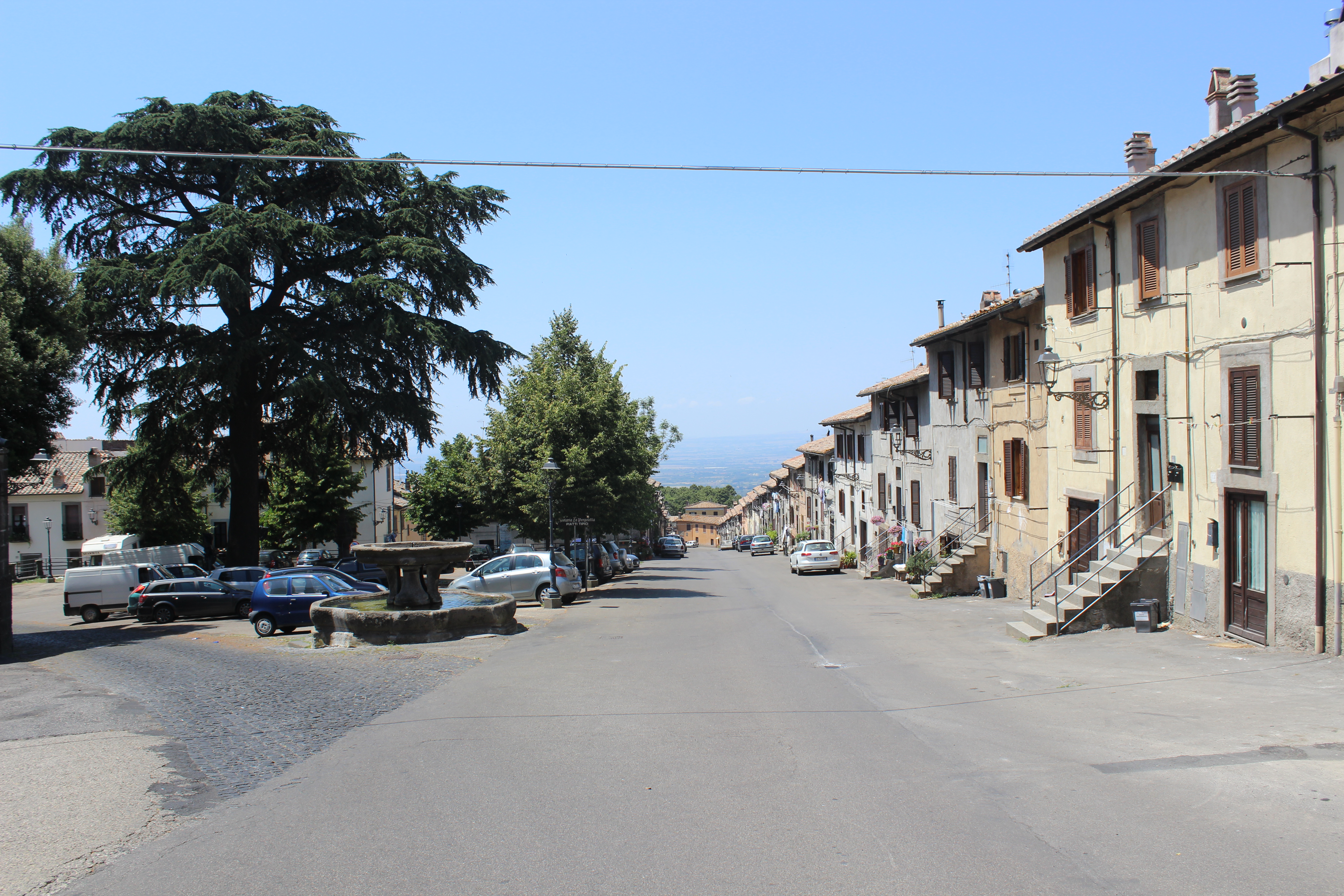 San Martino al Cimino Via Luigi Cadorna